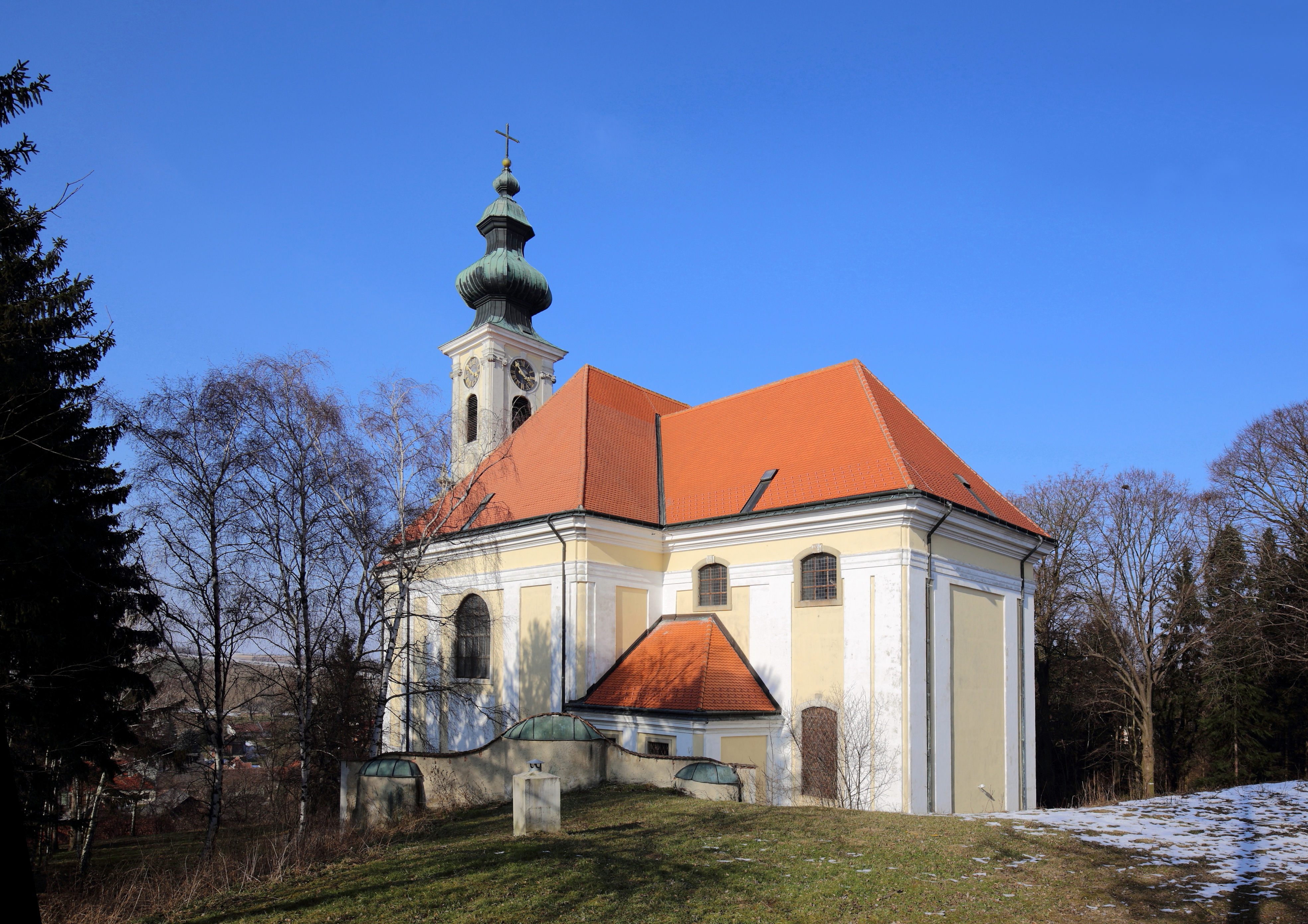 Südostansicht der katholischen Pfarrkirche hl. Nikolaus in Wolfpassing an der Hochleithen, ein Ortsteil der niederösterreichischen Gemeinde Hochleithen. Ein mächtiger barocker Bau, der auf einer Erhebung östlich des Ortes 1744 errichtet wurde und weithin sichtbar ist.